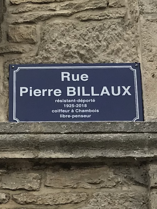 Pierre Billaux, résistant-déporté, 1925-2018, coiffeur à Chambois, libre-penseur